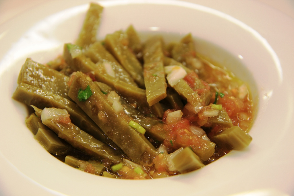 Ver artículo en mi Blog en Enlace See post in My blog at Link